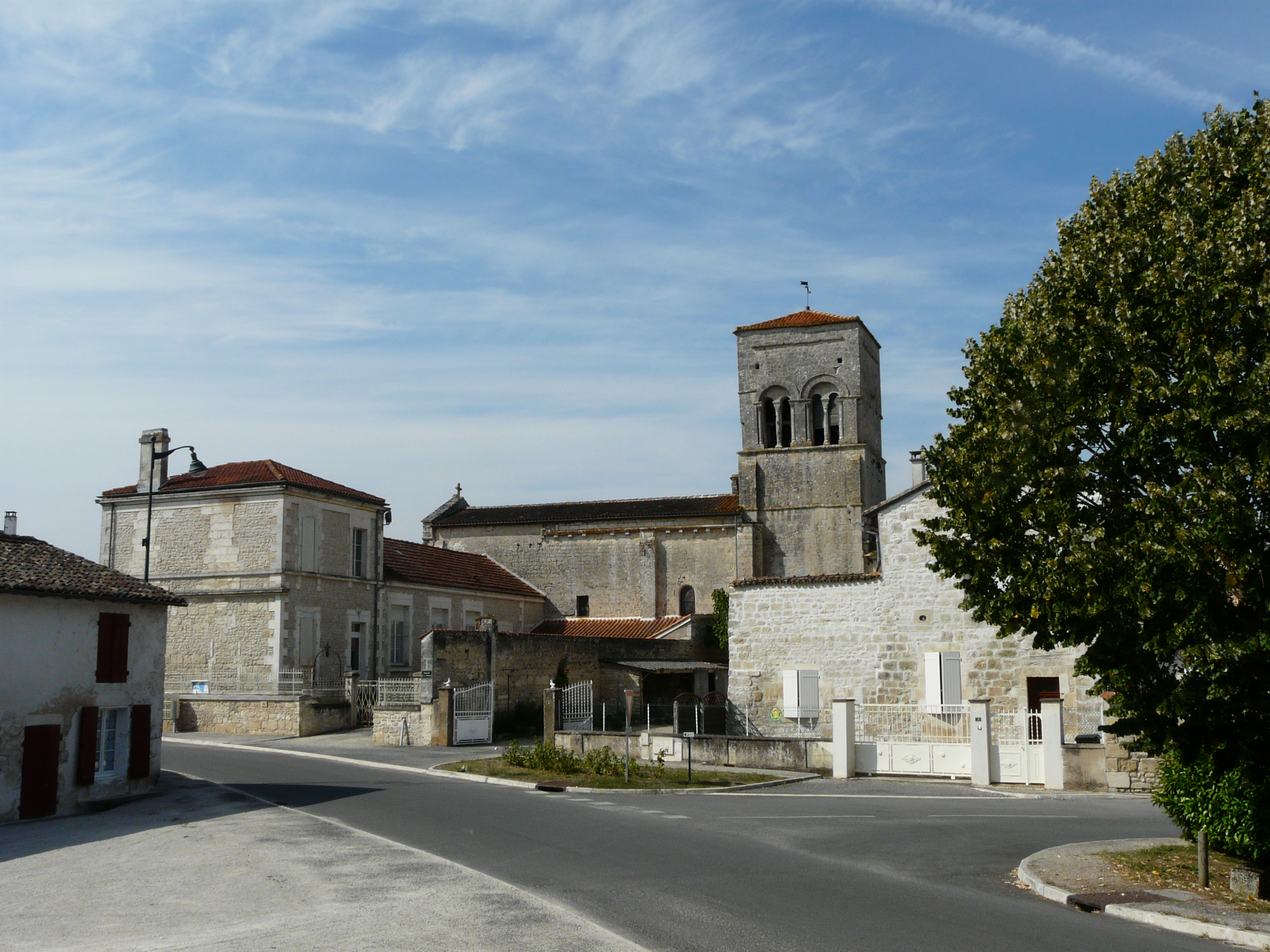 L'église Saint-Christophe dans le village de Vindelle, Charente, France.